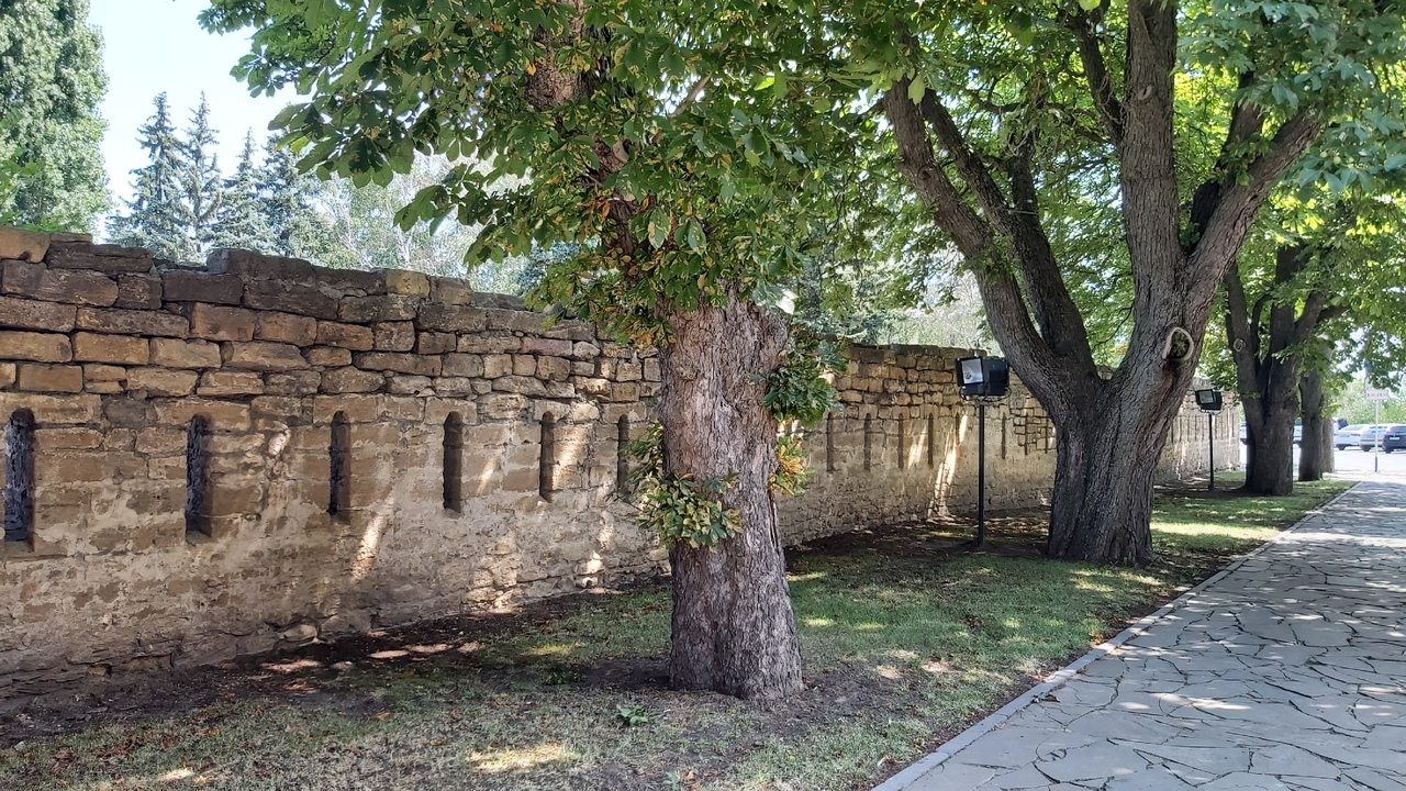 Оборонительная казарма для драгунских офицеров. Начало XIX века